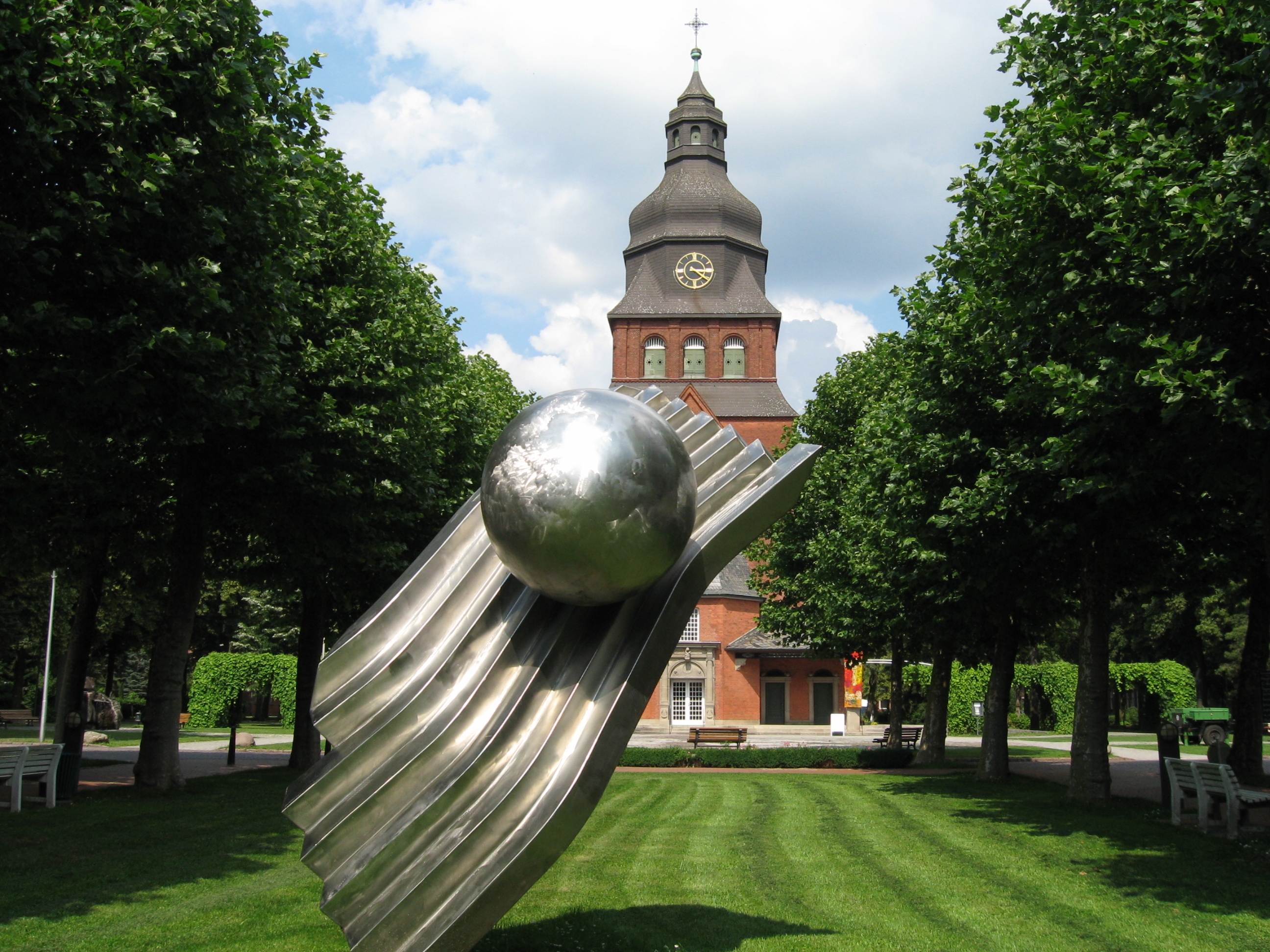 Skulptur Woge mit zwei Kugeln diametral im Johannesstift-Spandau